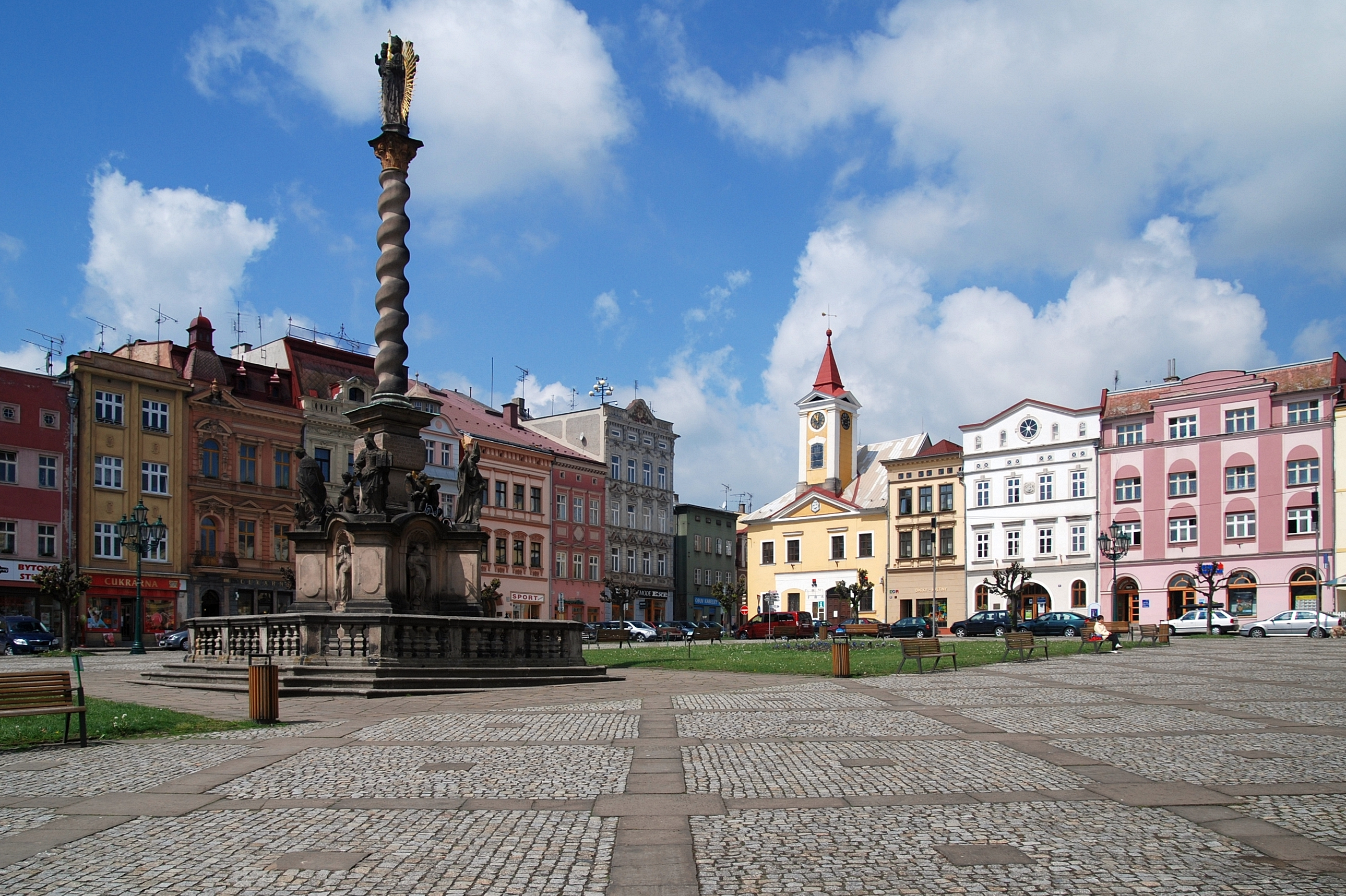 miasto Broumov